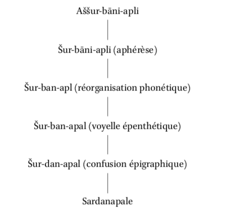 Ensemble des étapes par lesquelles le nom akkadien du souverain assyrien chemine vers son anthroponyme grec.